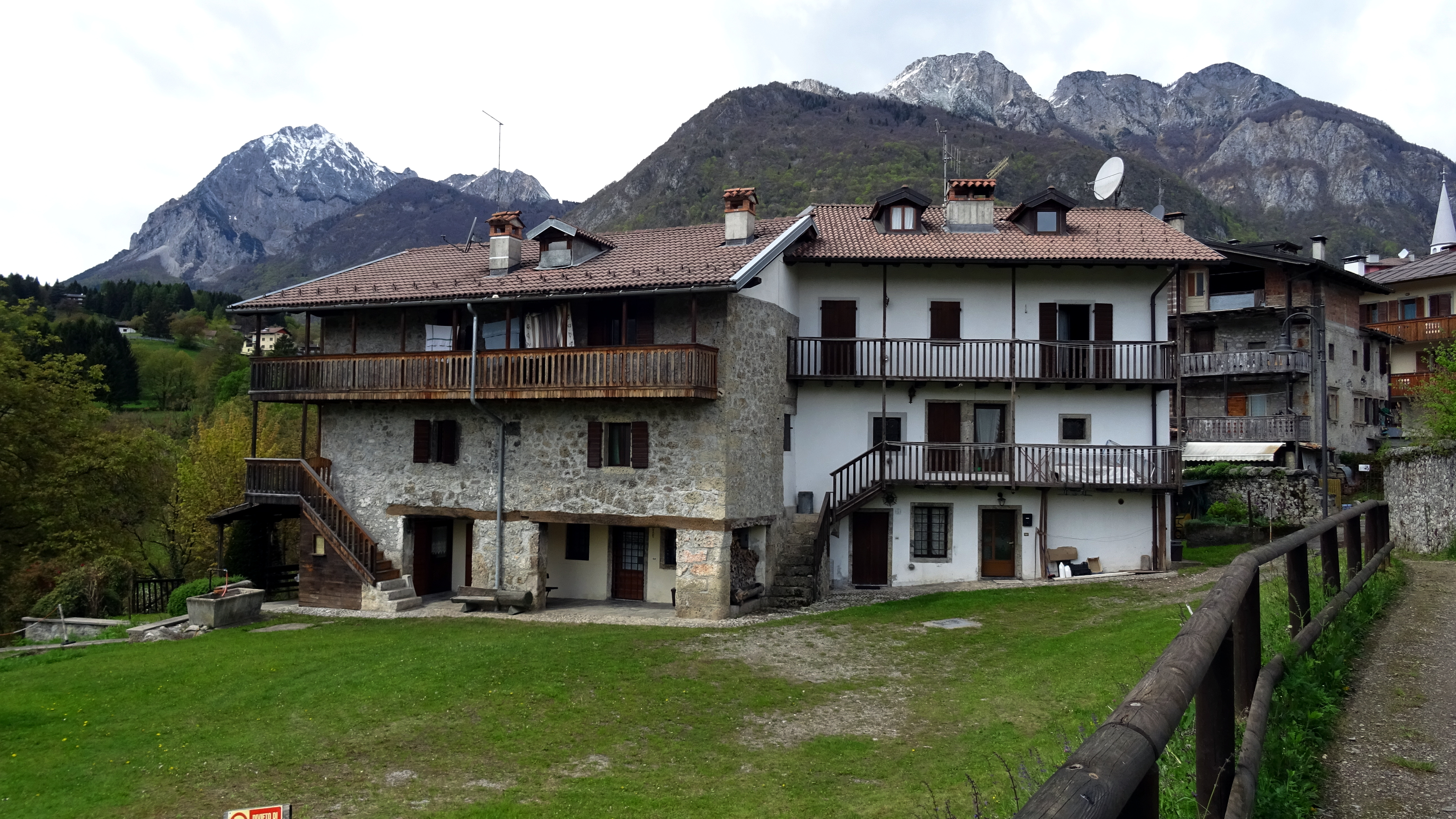 Case tipiche di Ampezzo ; sullo sfondo i monti Tinisa, Pura, Nauleni, Colmaier e Sesilis